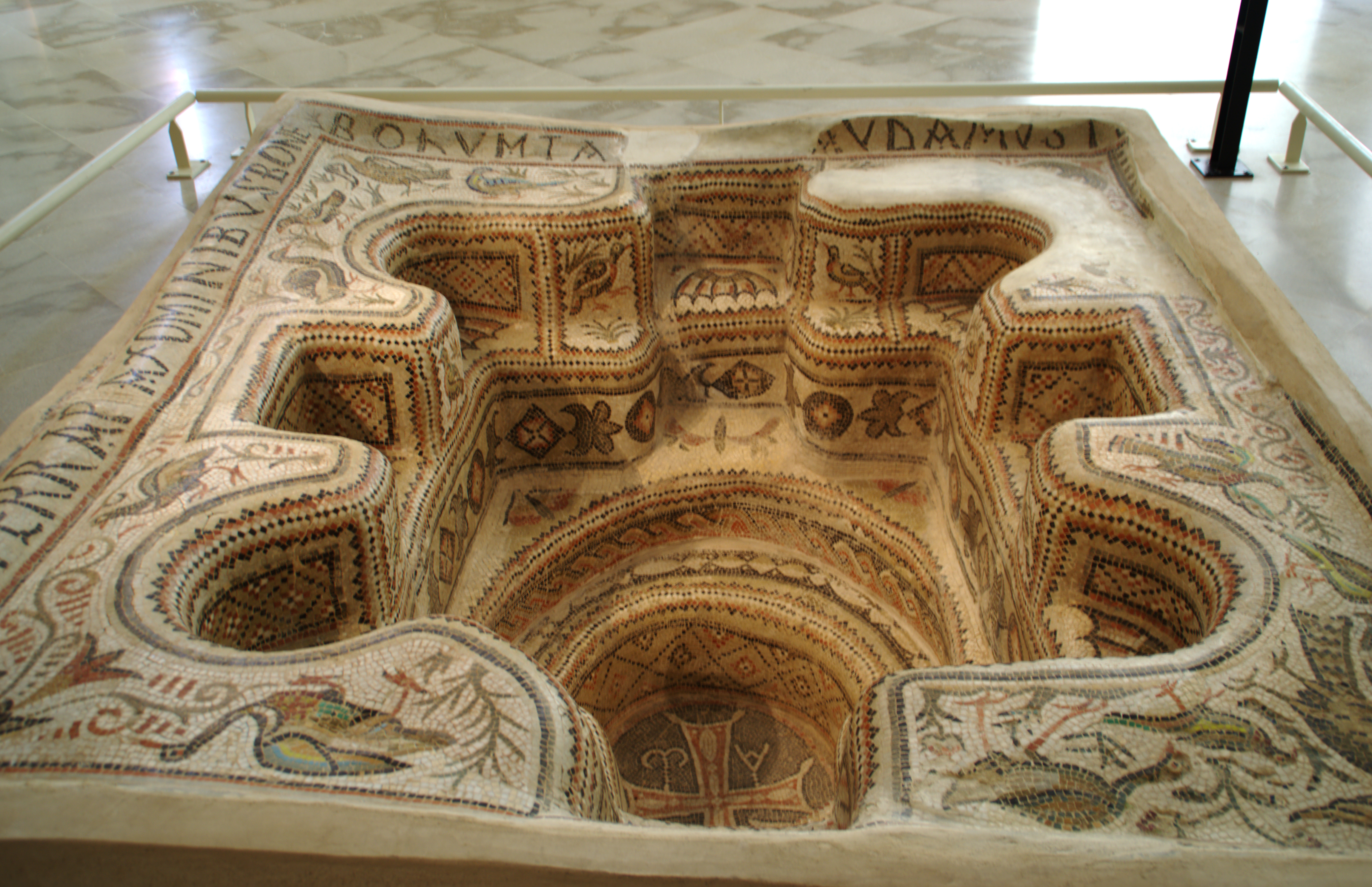 Baptistère retrouvée dans la région de Békalta (Monastir) exposée au musée archéologique de Sousse